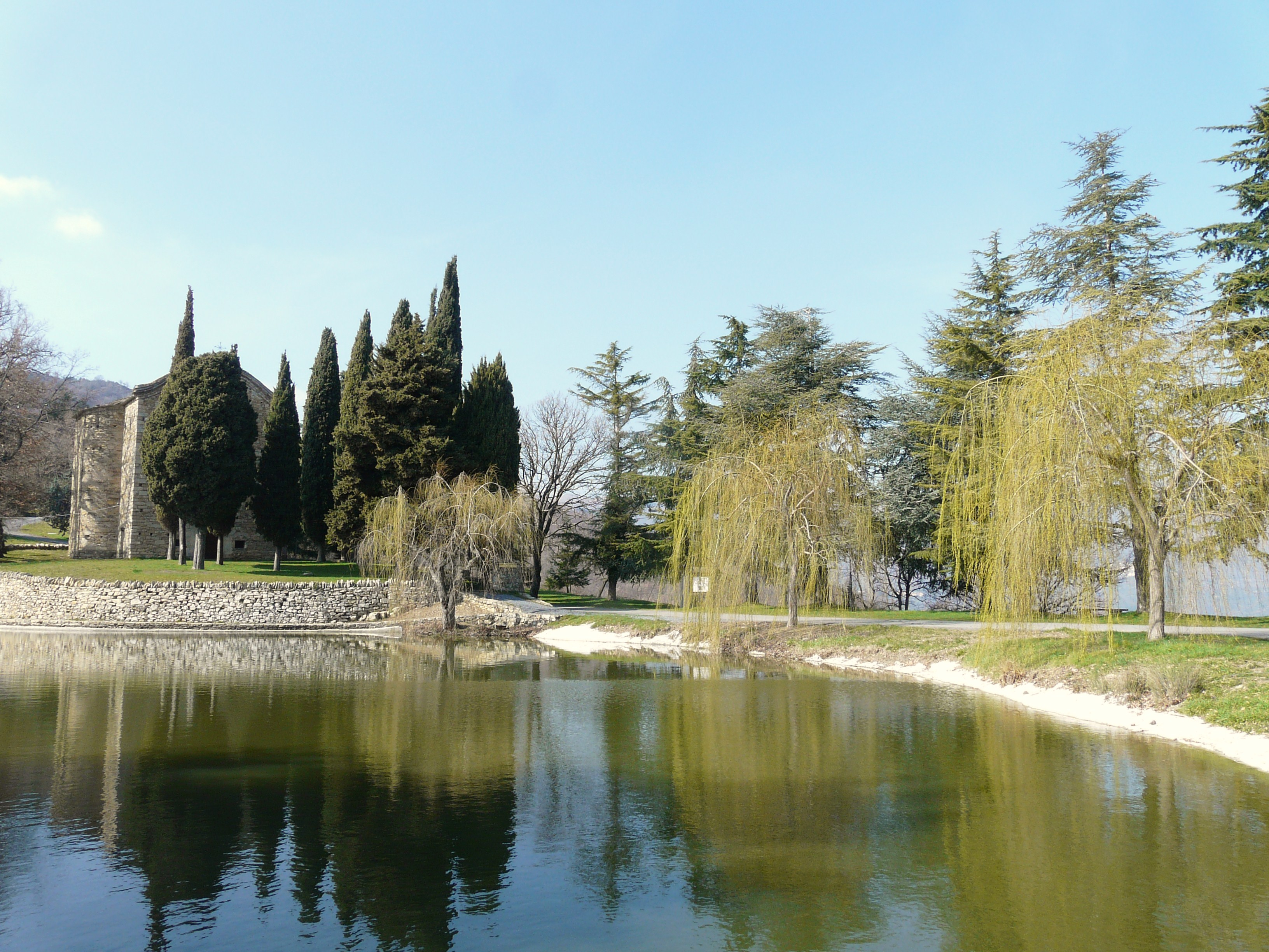 Laghetto di Santo Stefano, Lucinasco, Liguria, Italia